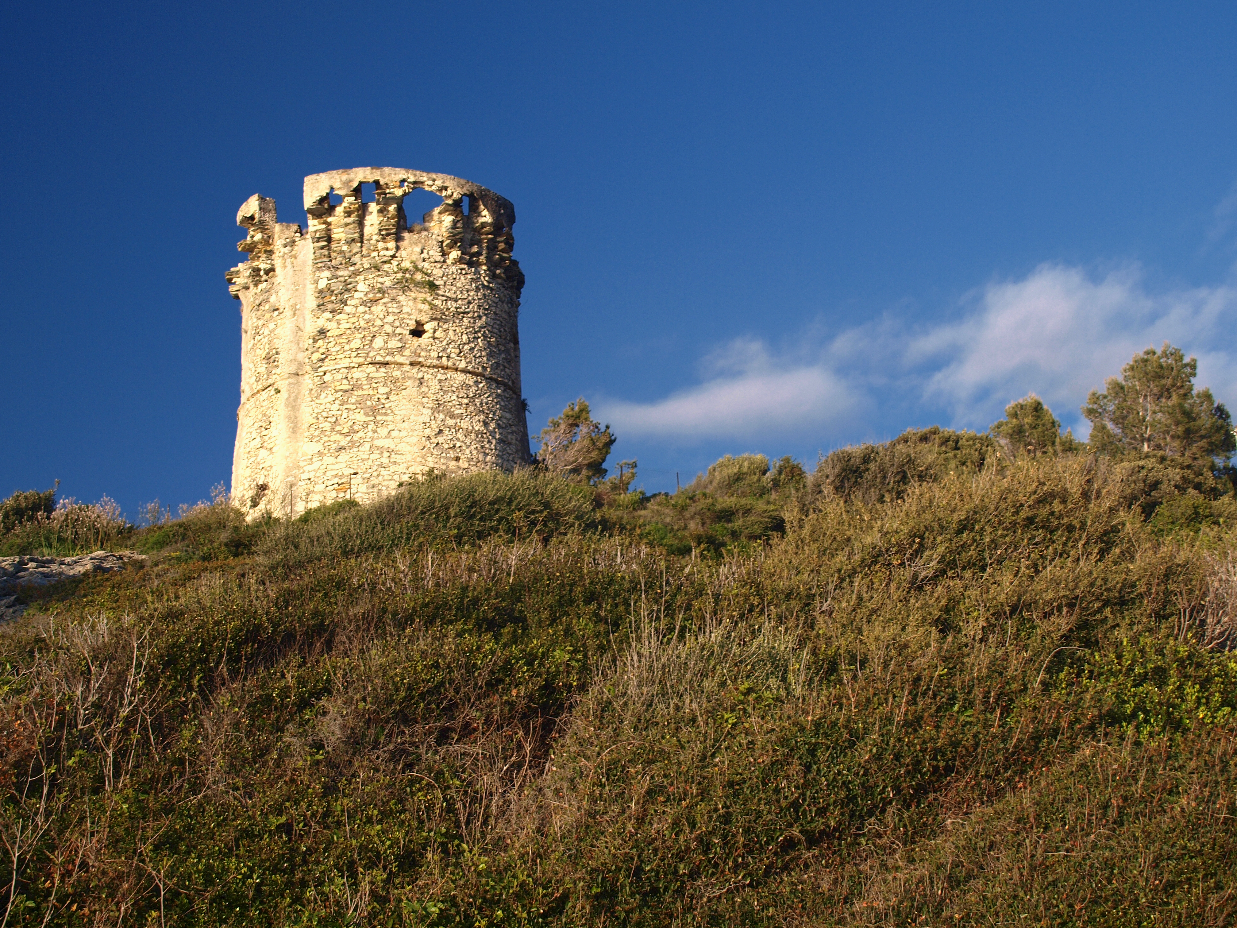 Farinole (Corsica) - Tour génoise à la Marine